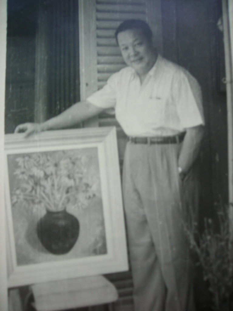 Họa sĩ Đào Sĩ Chu Sàigòn 1955